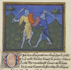 Chroniques de Bertrand Du Guesclin. Roman d’Ogier le Danois, 1405, Chantilly (musée de Condé)